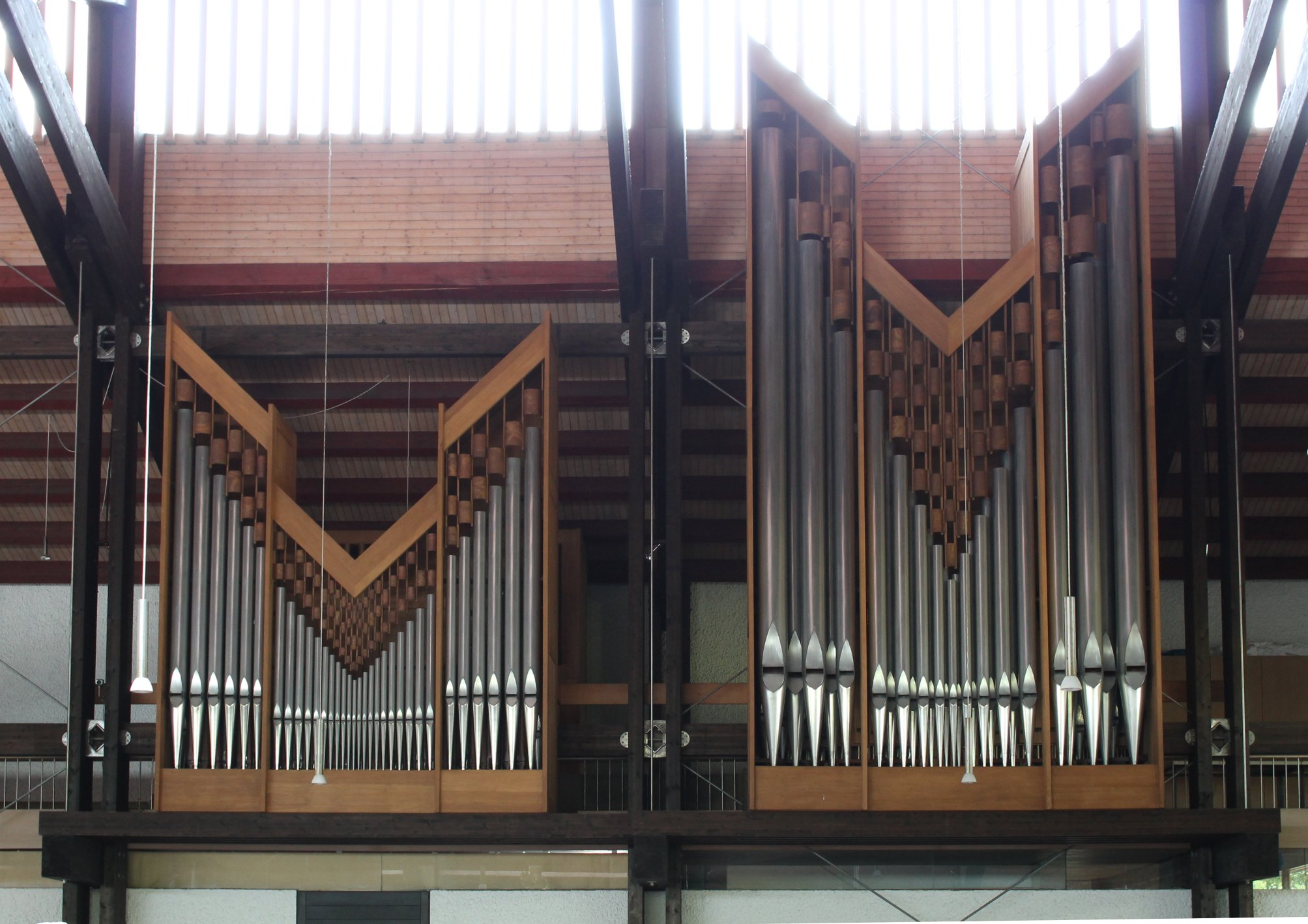 Orgel von St. Johann Baptist in Ismaning (1980, Rieger Orgelbau, II/27)